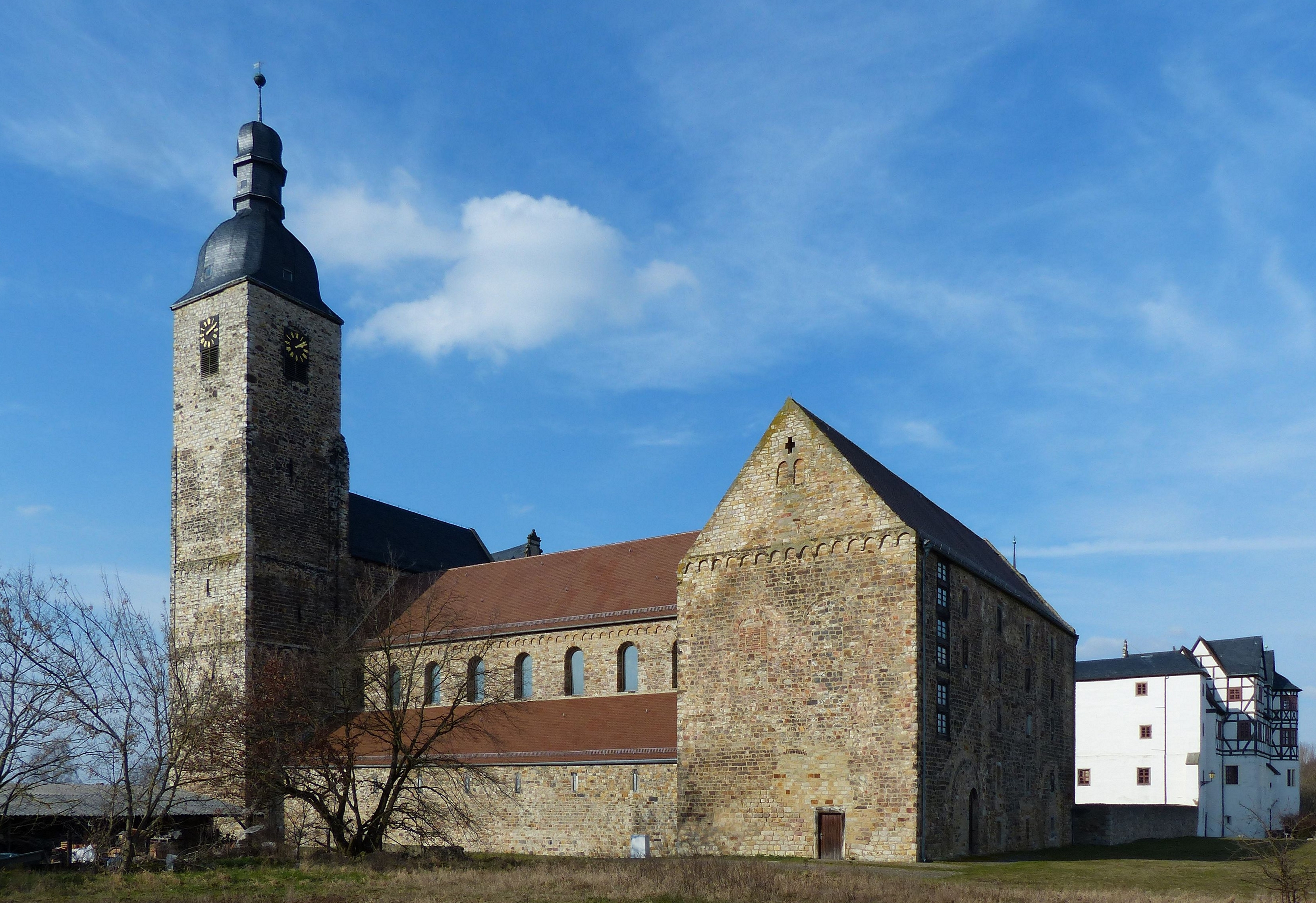 Anstelle der Petruskirche der Prämonstratenser-Chorherren wurde für ihr Stift 1155 ein Neubau, der den Namen Sancta maria in monte erhielt, geweiht. Nach Aufhebung der Ordensgemeinschaft erfolgte 1591 ein Umbau zur Schlosskirche, deren Ruine nach Rekonstruktion das heutige Bauwerk ist.